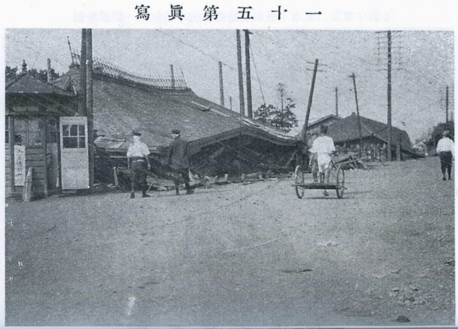 関東大震災で倒壊した藤沢駅の駅舎。土木学会附属土木図書館デジタルアーカイブスで閲覧可能。